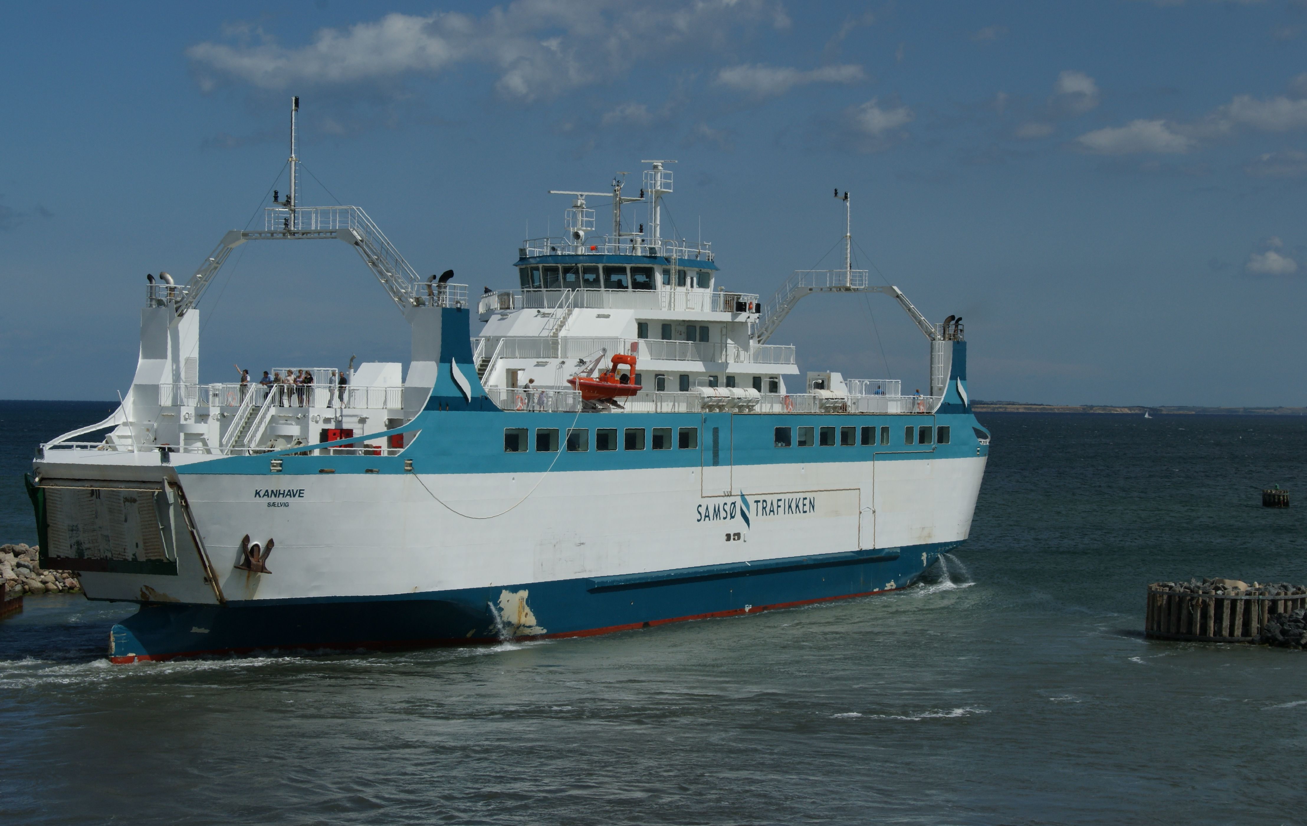 Kanhave på vej mod Samsø - bound for Samsø